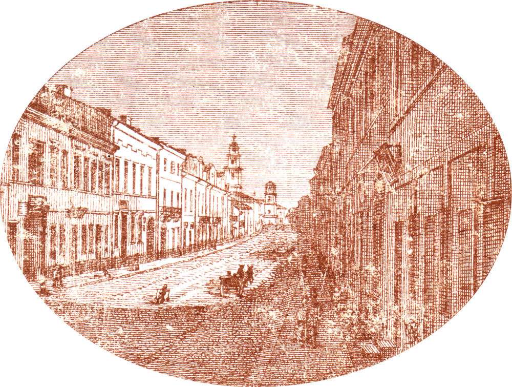 Беларуская (тарашкевіца): Вуліца Францішканская ў Менску